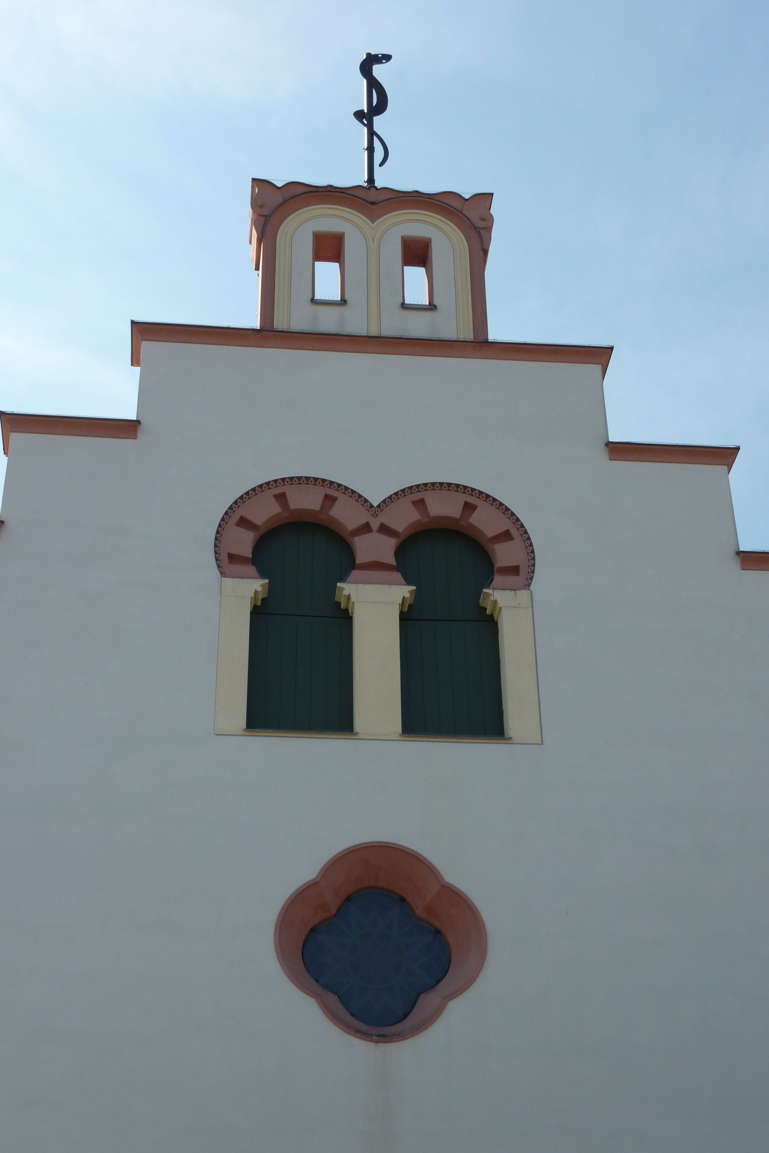 Synagoge in Binswangen, Ostseite